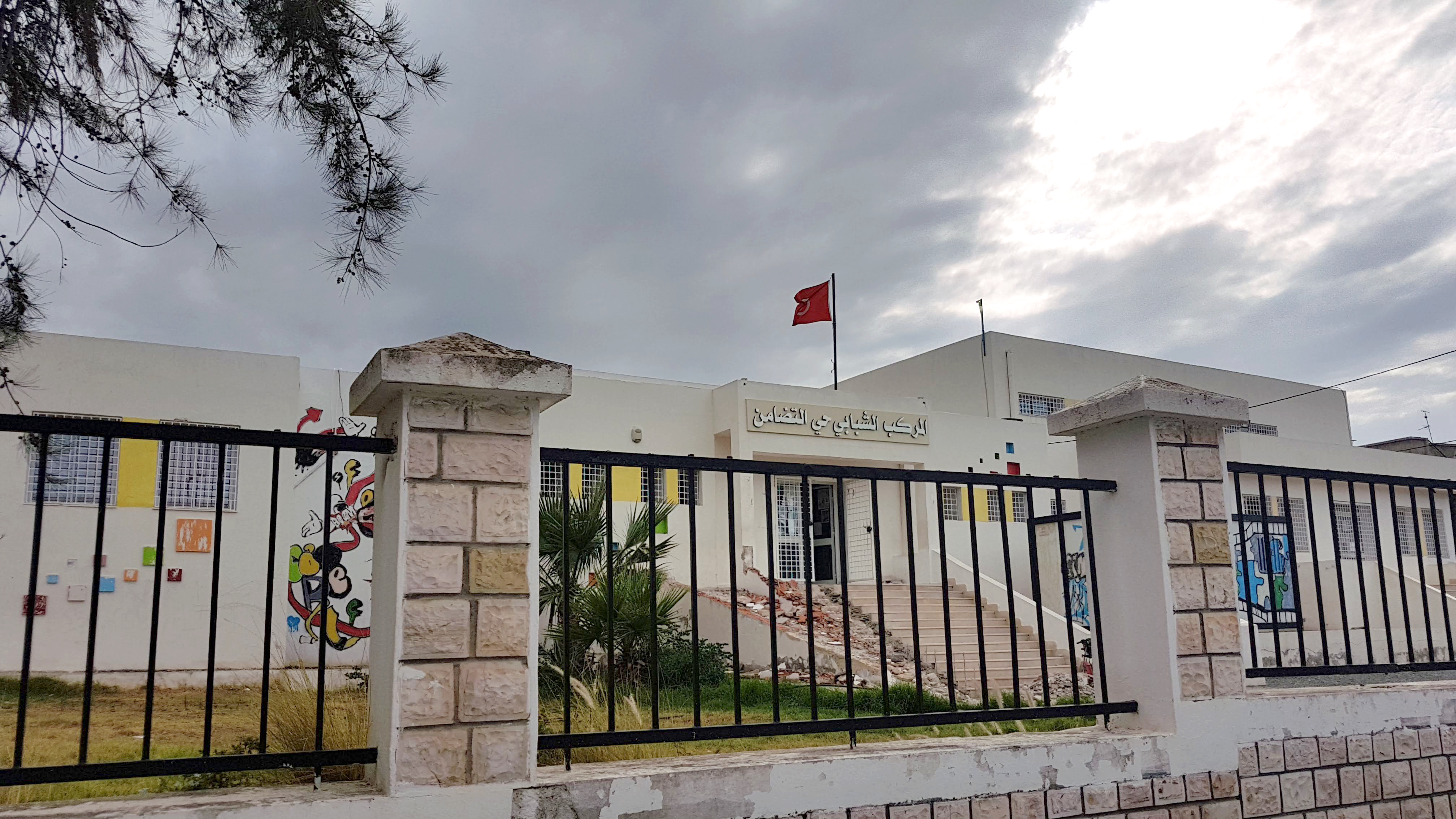 Façade Cite des jeunes ettadhamen